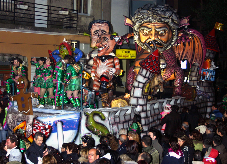 Sfilata del carnevale Guspinese